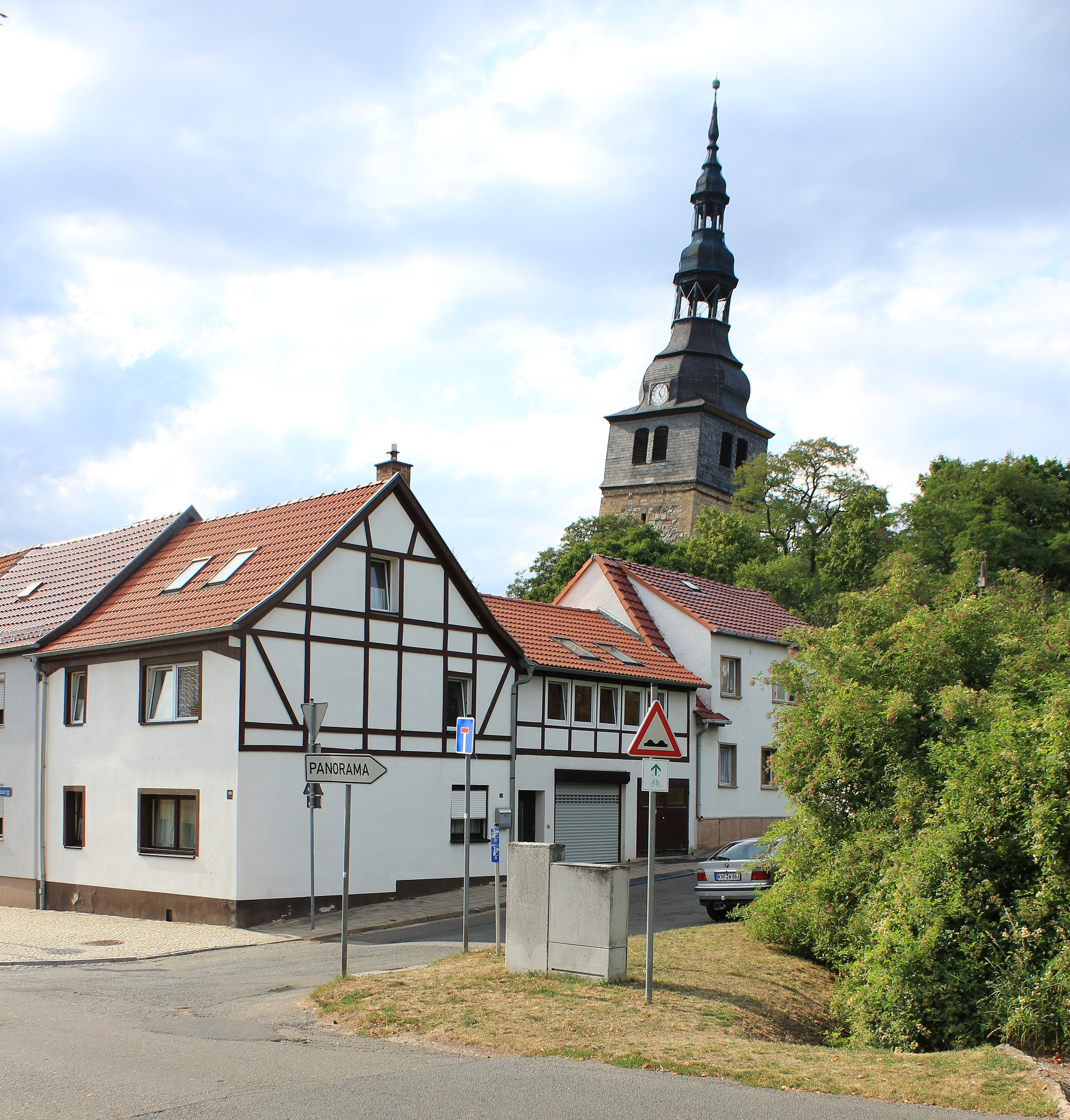 In Bad Frankenhausen. Sachsen.